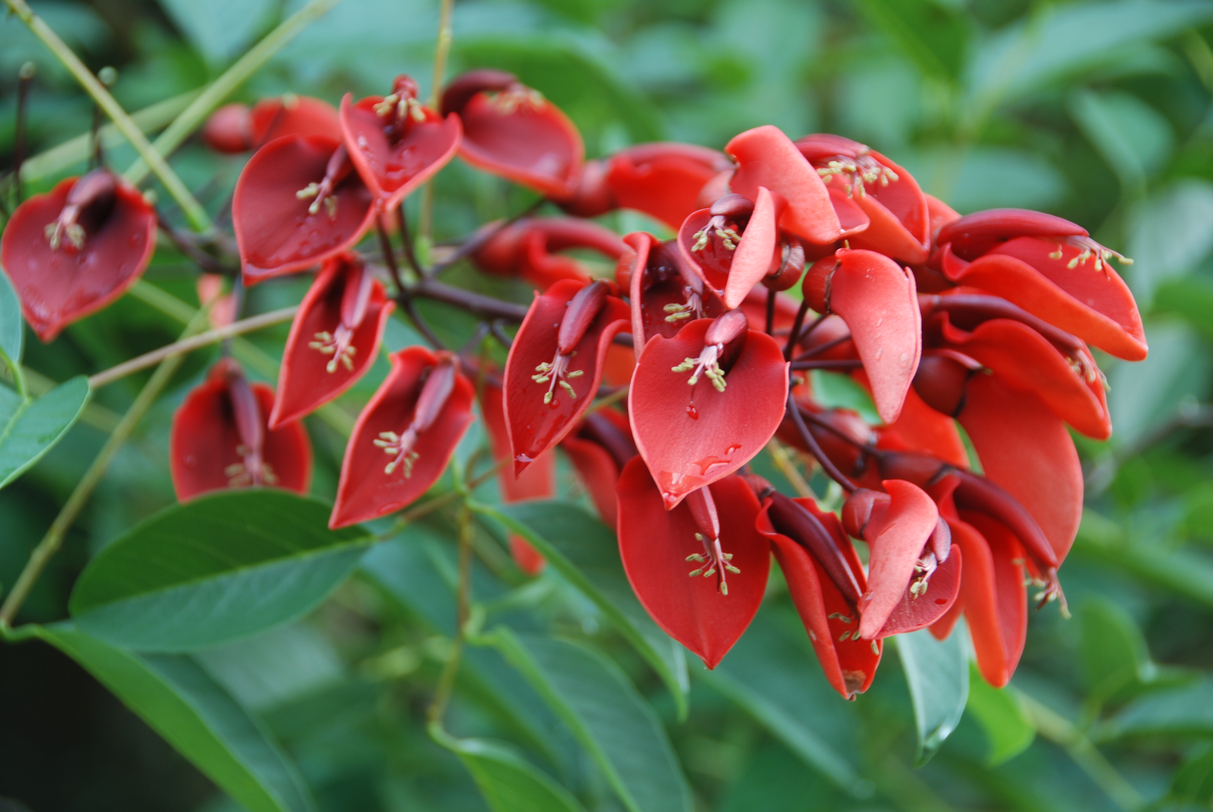 Ceibo Uliako Mintegi Parkean